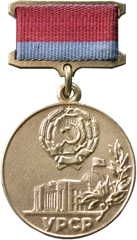 Нагрудный знак Почётная грамота Президиума Верховного Совета Украинской ССР